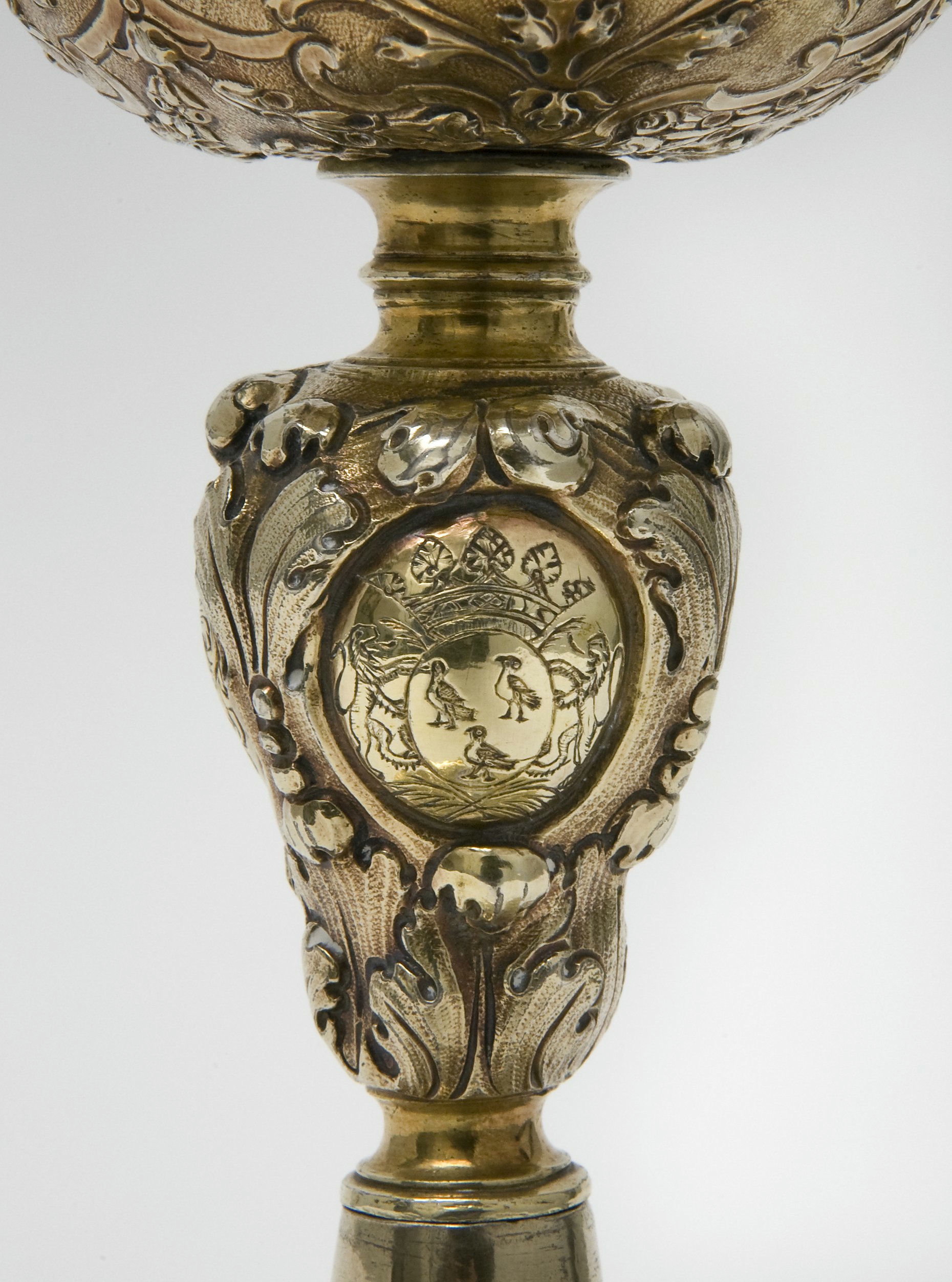 Sint Gerlachuskerk: Interieur, detail van kelk met het wapen van priorin Isabella van Raveschot. Vervaardigd tussen 1728 en 1733 door Johannes Joachim Lutz uit Augsburg. (opmerking: Gefotografeerd voor publikatie voor het boek Heiligdom / Sanctuary Sint Gerlach.)